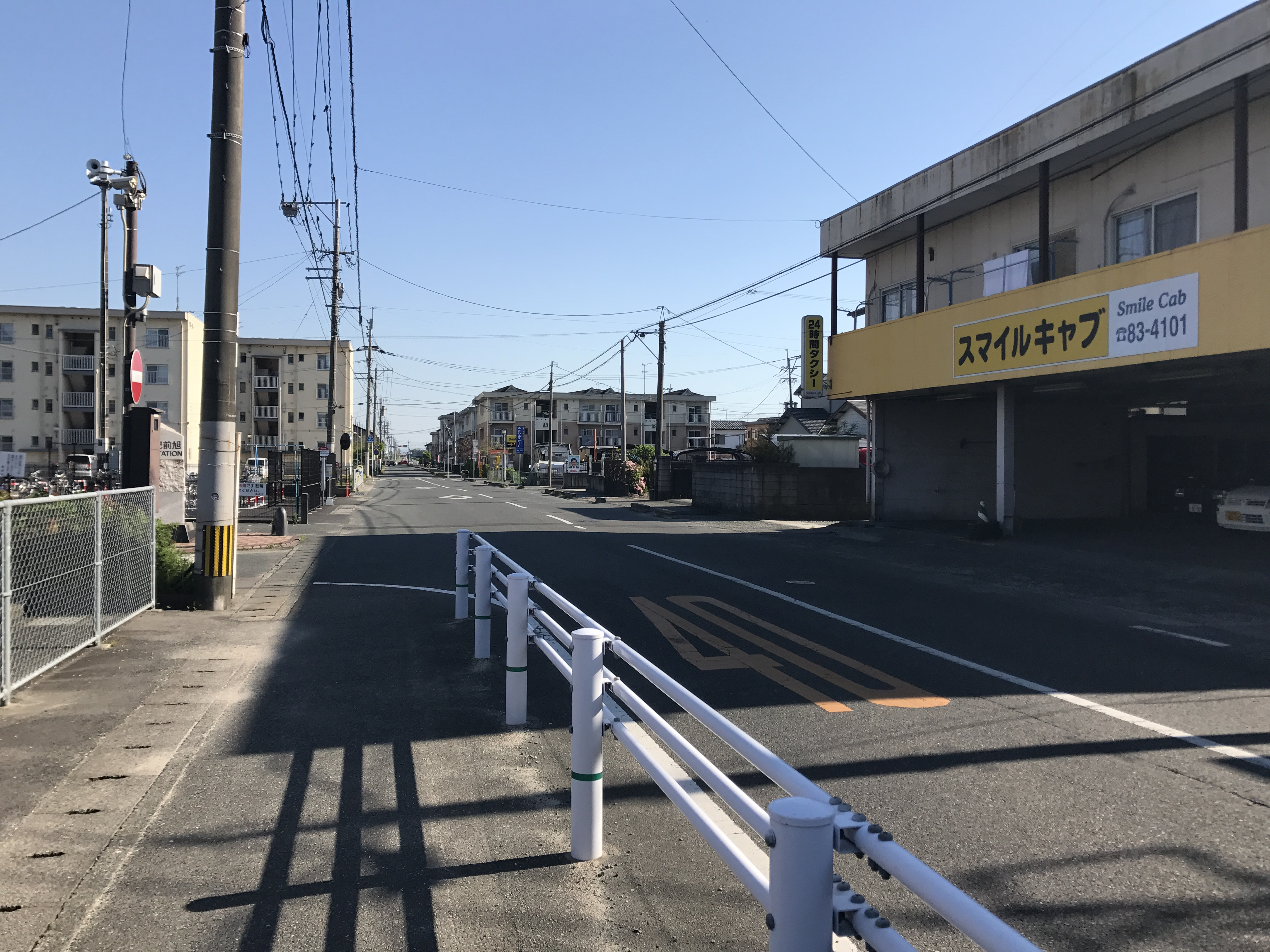 肥前旭駅付近の佐賀県道302号